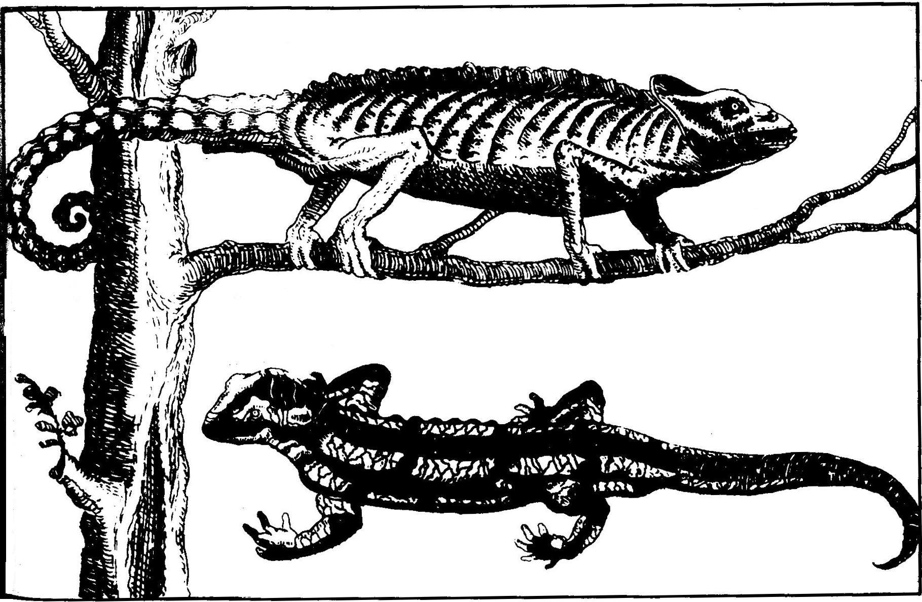 Abbildung eines Chamäleons und eines Salamanders (?) aus dem Buch Madagascar von Hieronymus Megiser